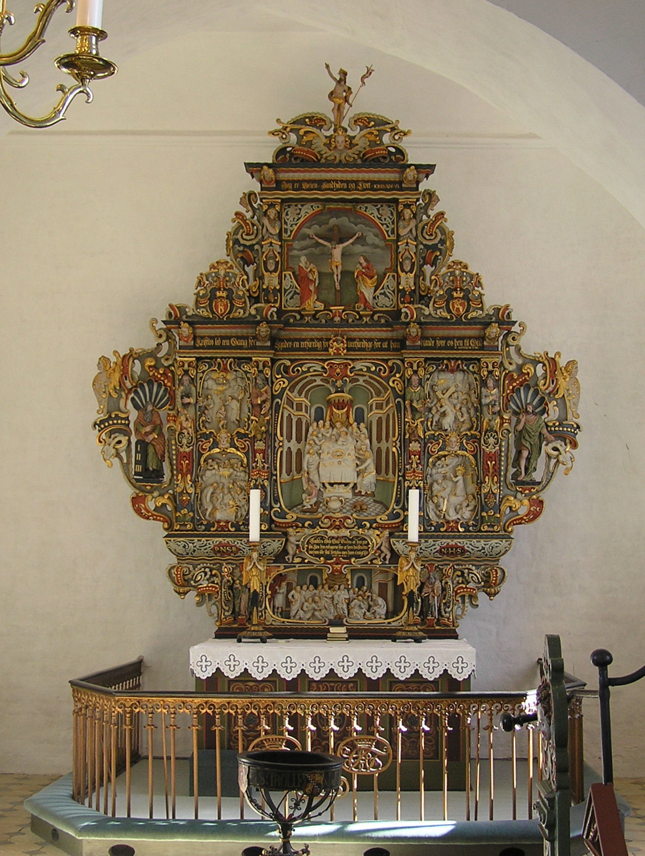 Alteret i Vester Egesborg Kirke, Næstved. Altertavle er fra 1655 og er skåret af Abel Schrøder den Yngre i bruskbarok. Den har en flot bemaling.